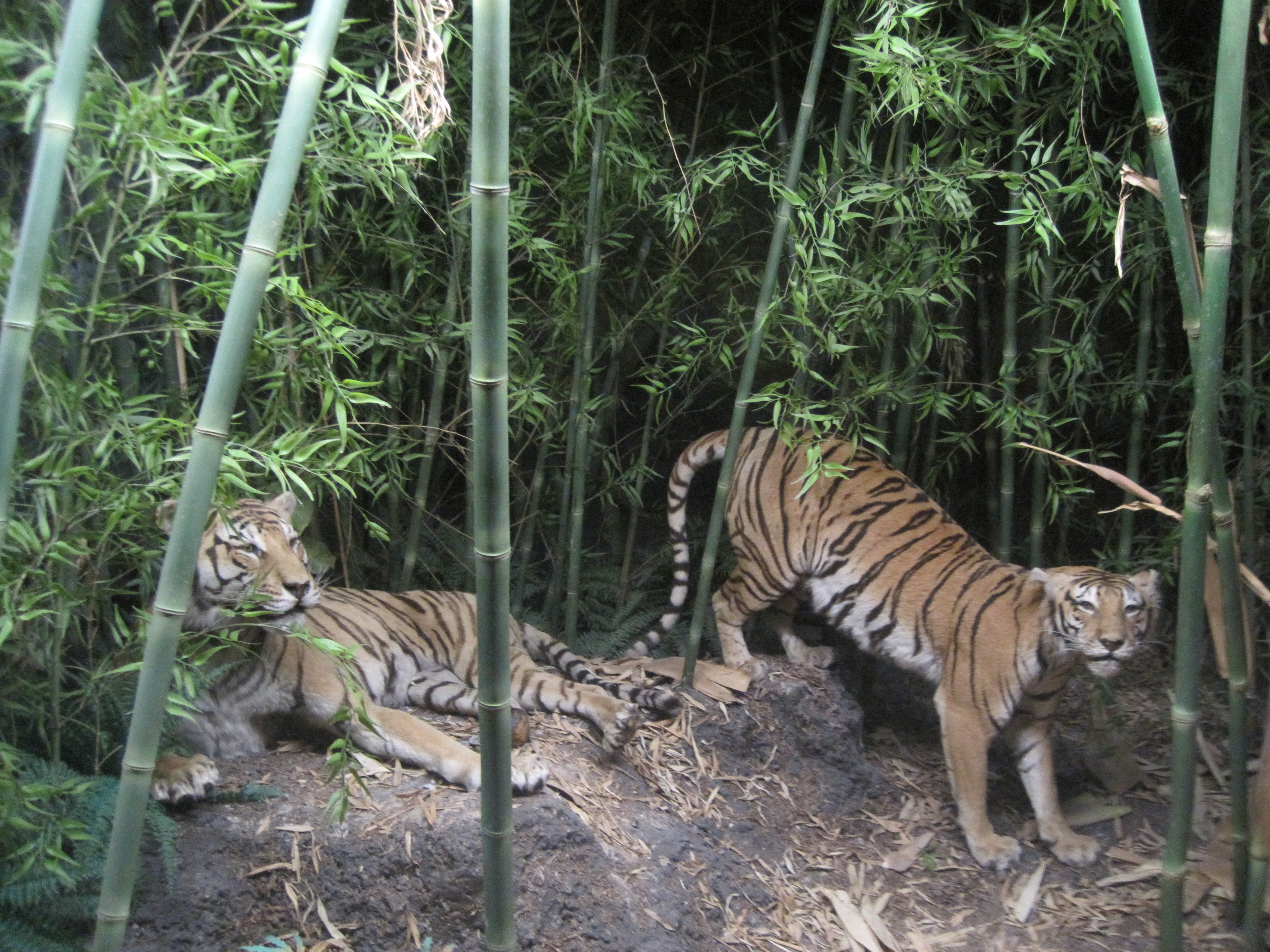 Diorama mit ausgestopften Tigern im Naturhistorischen Museum der Burgergemeinde Bern